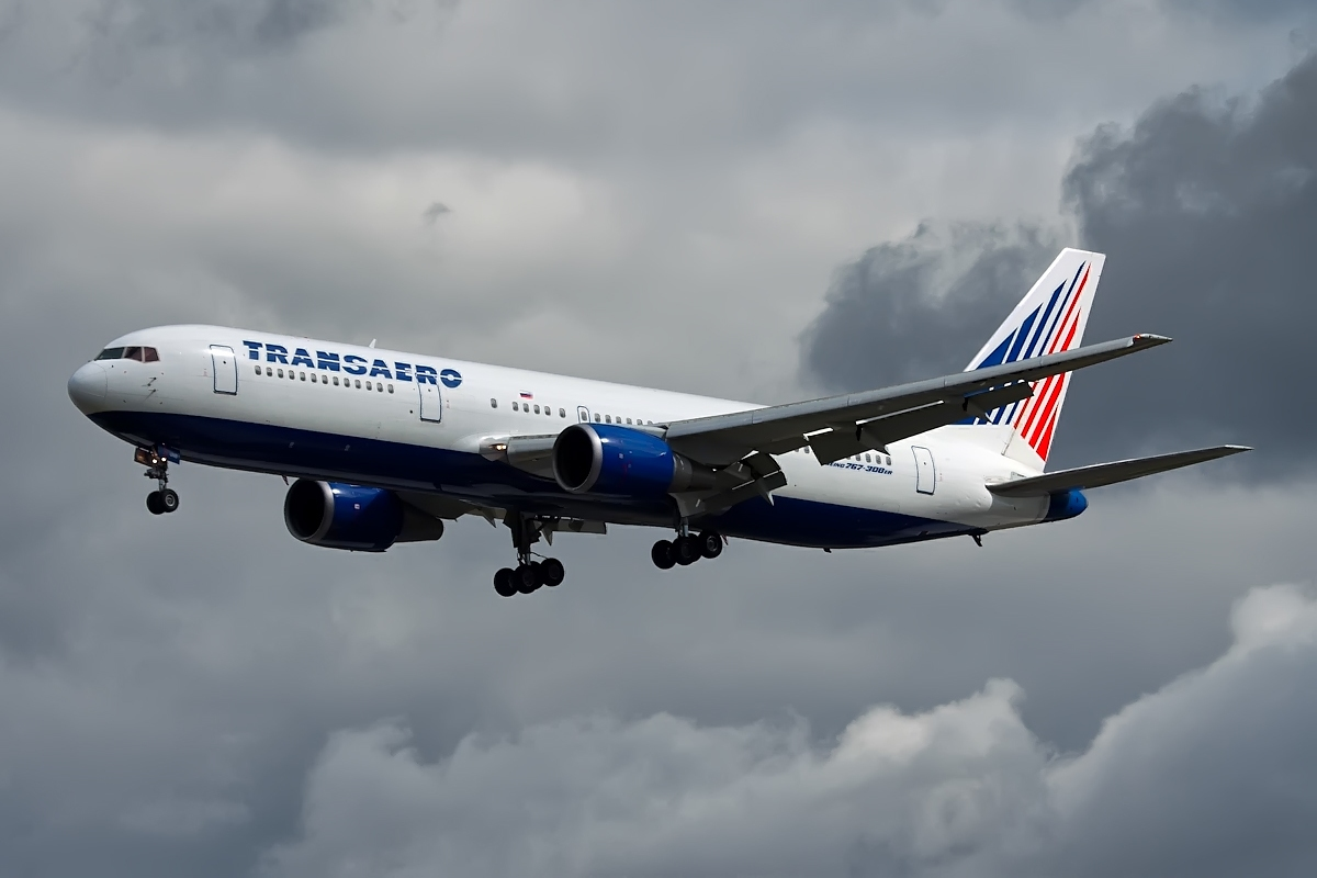 EI-UNB - 4CA655 - Transaero - Boeing 767-3P6ER (26234)